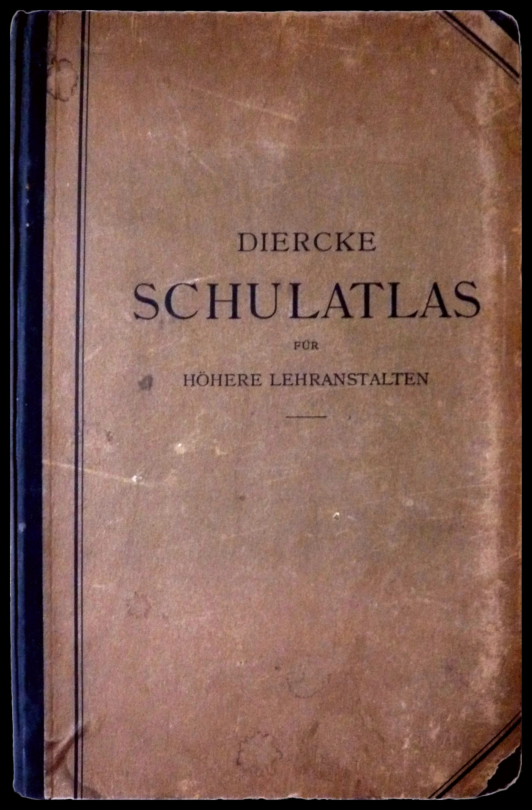 Schulatlas